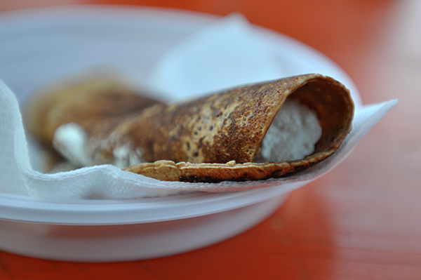 Neccio ripieno con ricotta - Italia